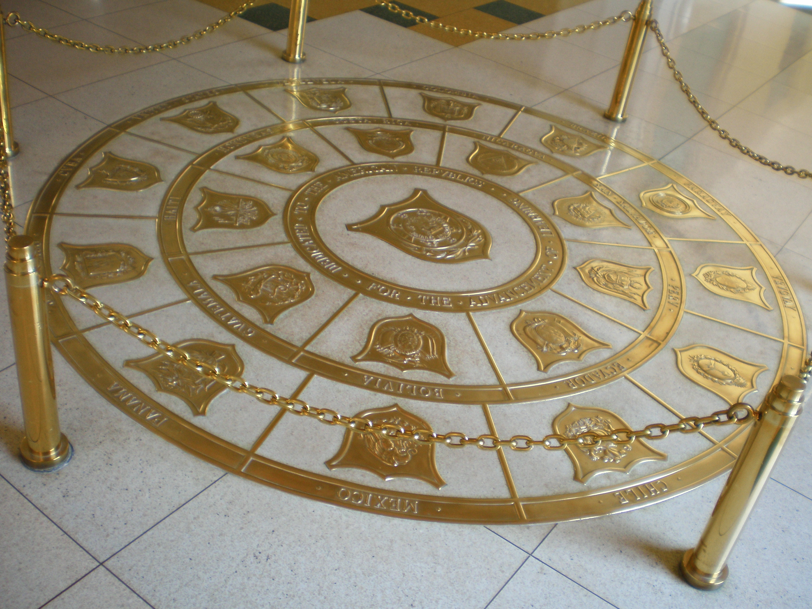 Símbolo de la Unión de pueblos panamericanos en la Torre de la Universidad de Puerto Rico Athor:me (with Olympus FE-190)